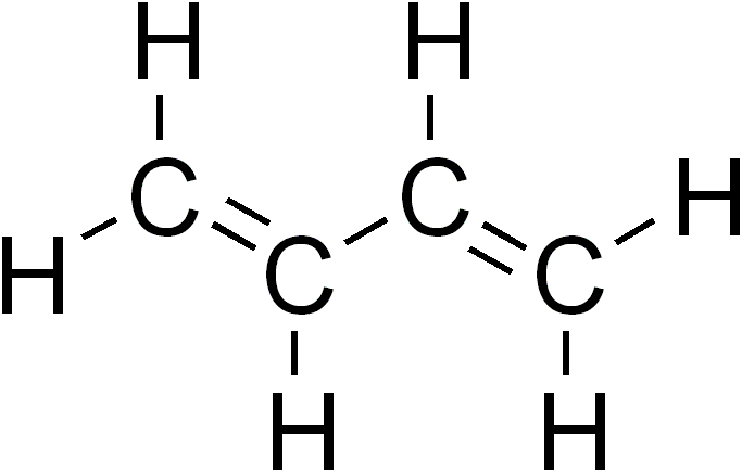 formule 2D du butadiène